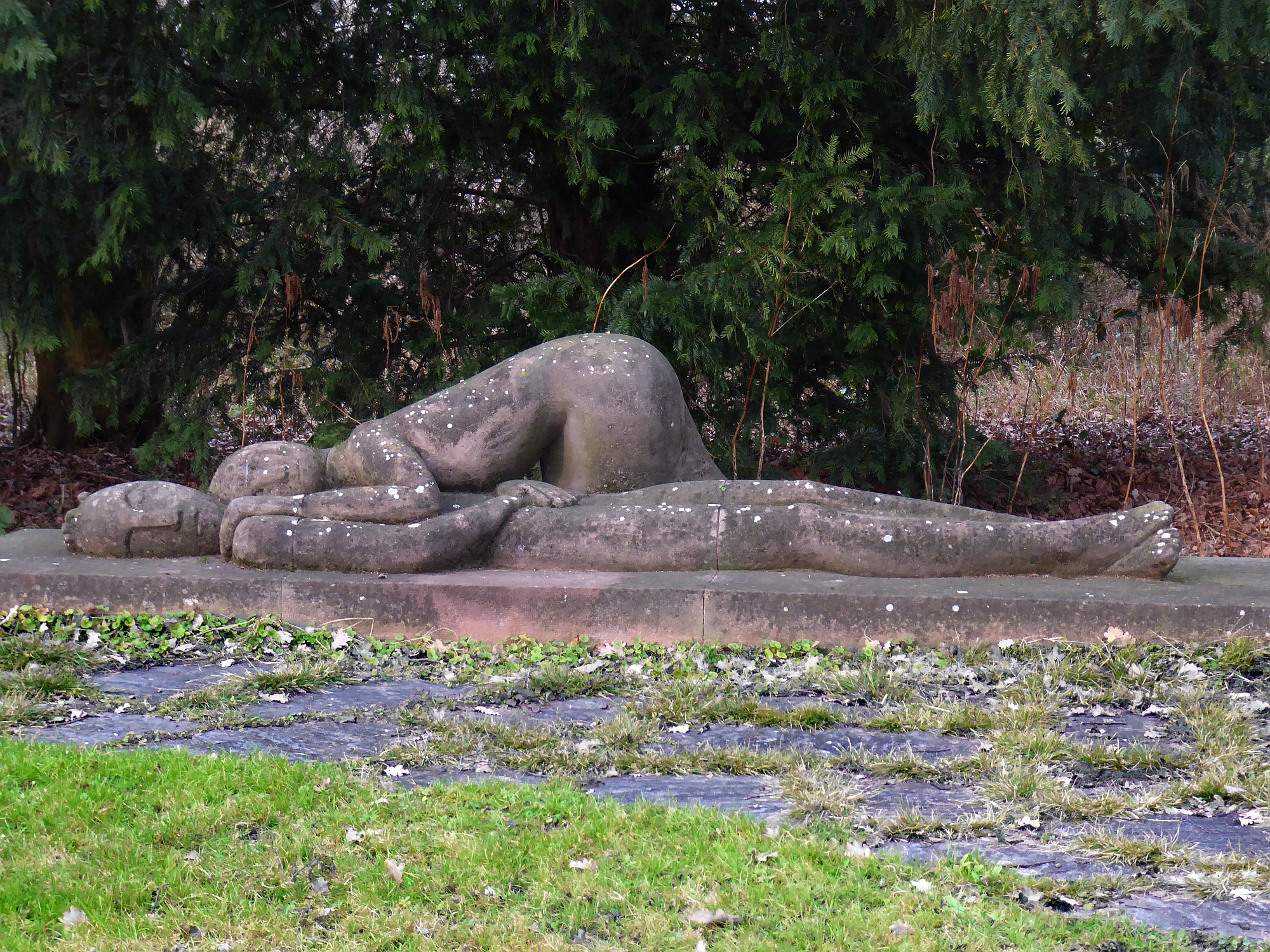 Peter Moilliet (1921–2016) Bildhauer, Pietà, roter Sandstein, 1947–1949, Skulptur auf dem Friedhof am Hörnli, Standort: 47°34'05.5"N 7°38'24.5"E, 47.568193, 7.640134